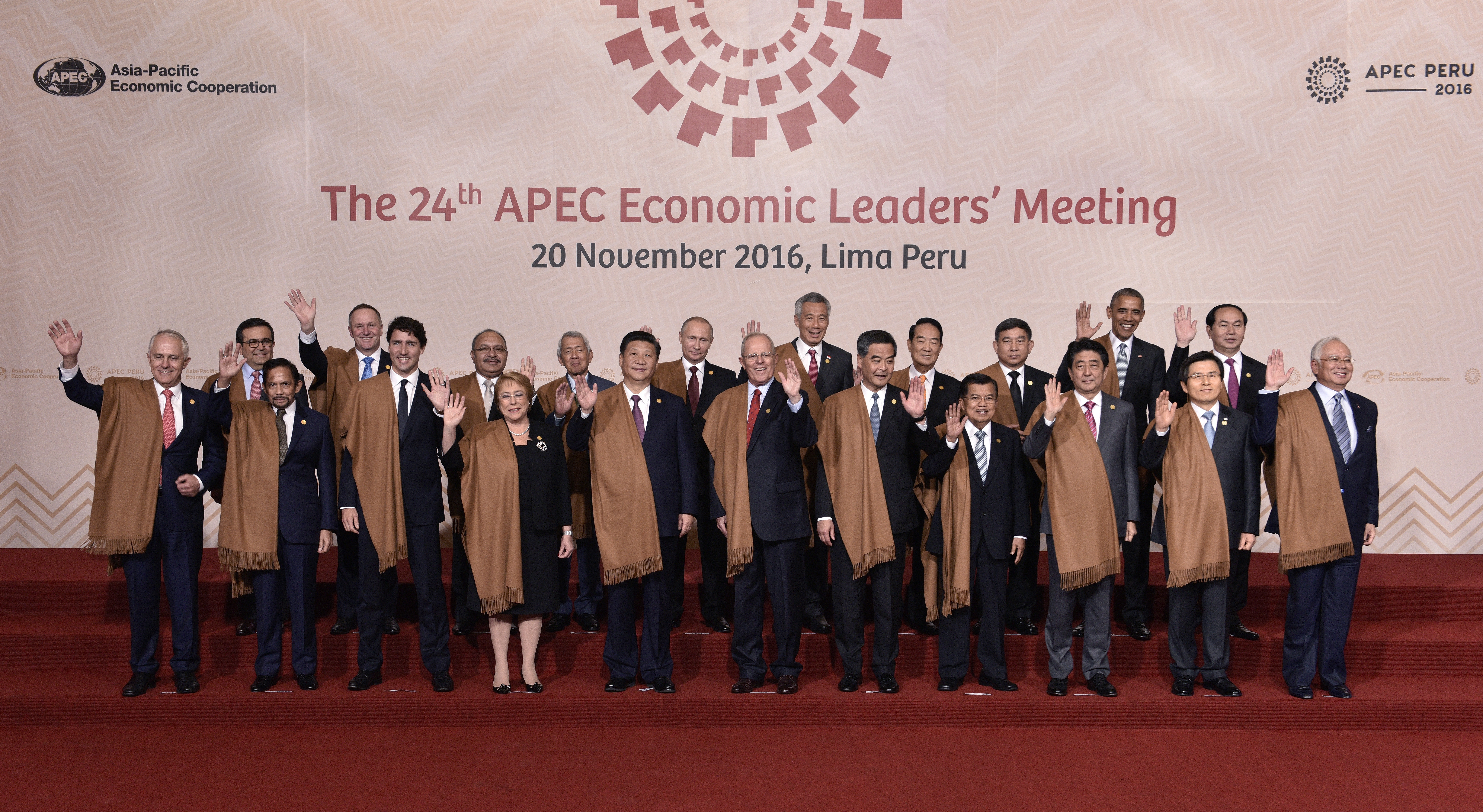 Foto Oficial de la 24 Cumbre de líderes del Foro Económico Asia-Pacífico APEC2016